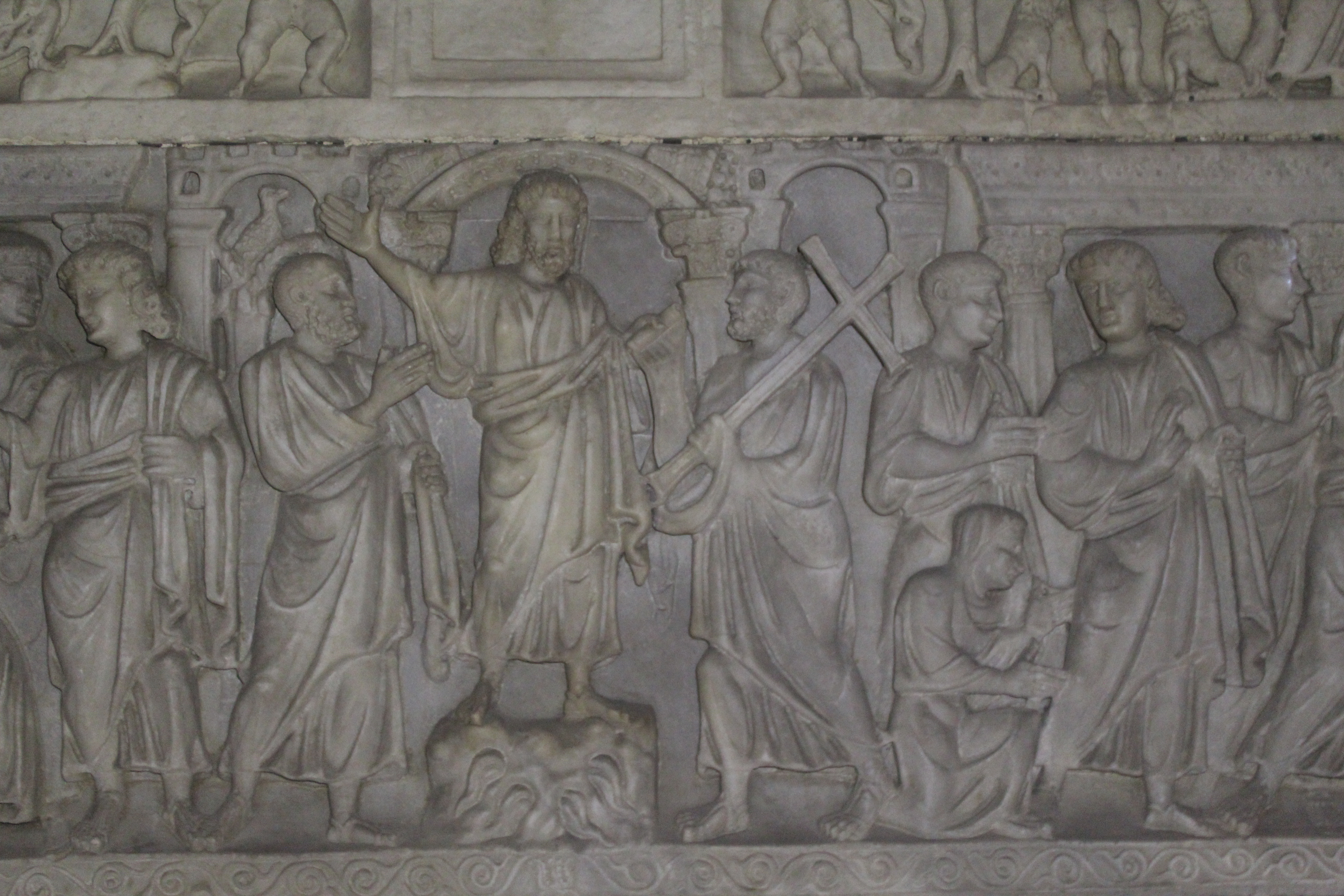 Sarcofago del IV secolo conservato nella cripta della chiesa di San Giovanni in Valle a Verona